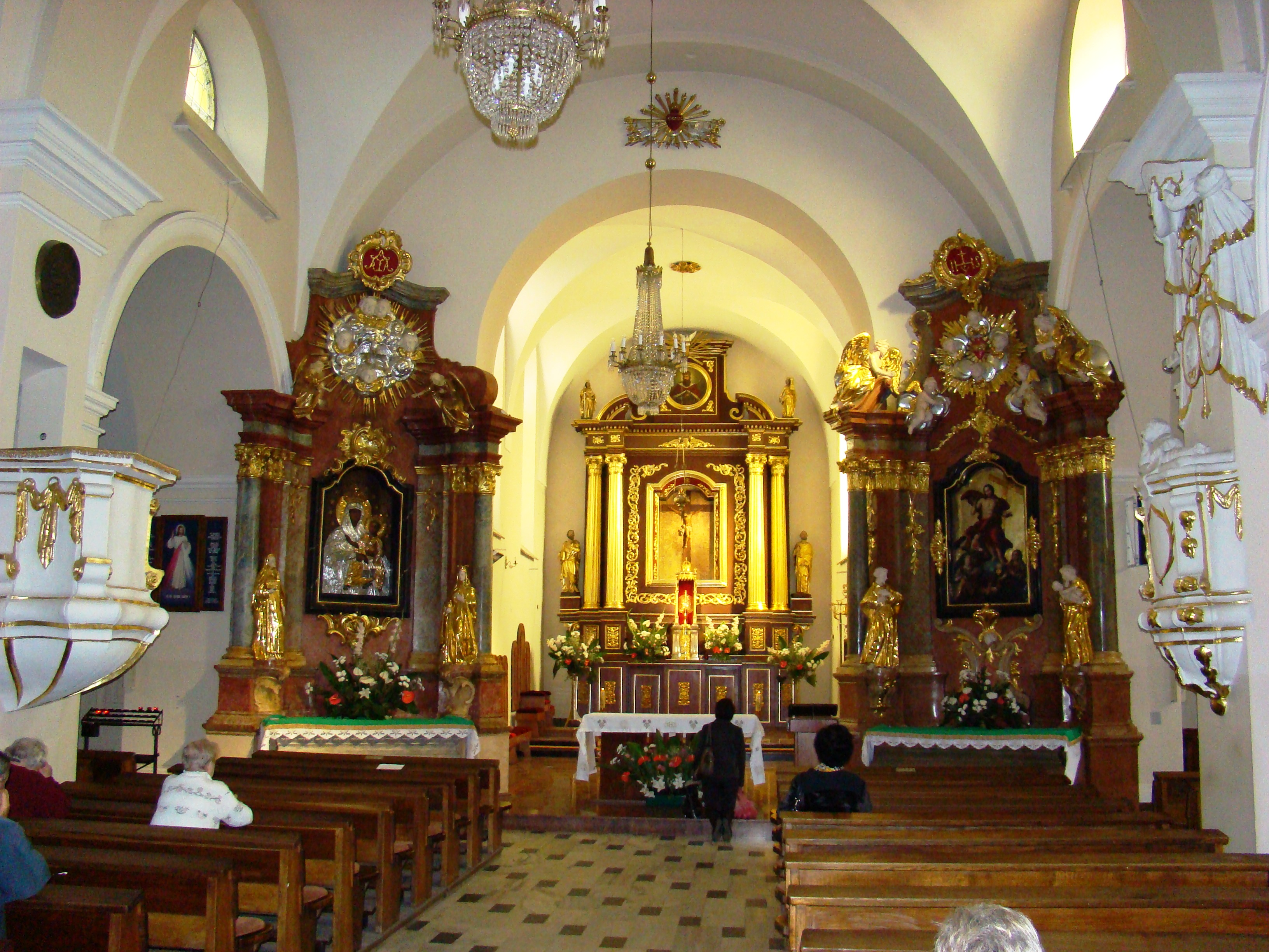 Wnętrze kościoła św. Zygmunta w Częstochowie (zabytek nr A-3/78 z 13.02.1978)